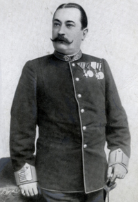 Капельмейстер Альфонс Цибулка